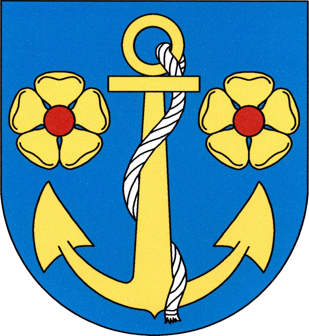 Znak obce Střížovice (okres Jindřichův Hradec)